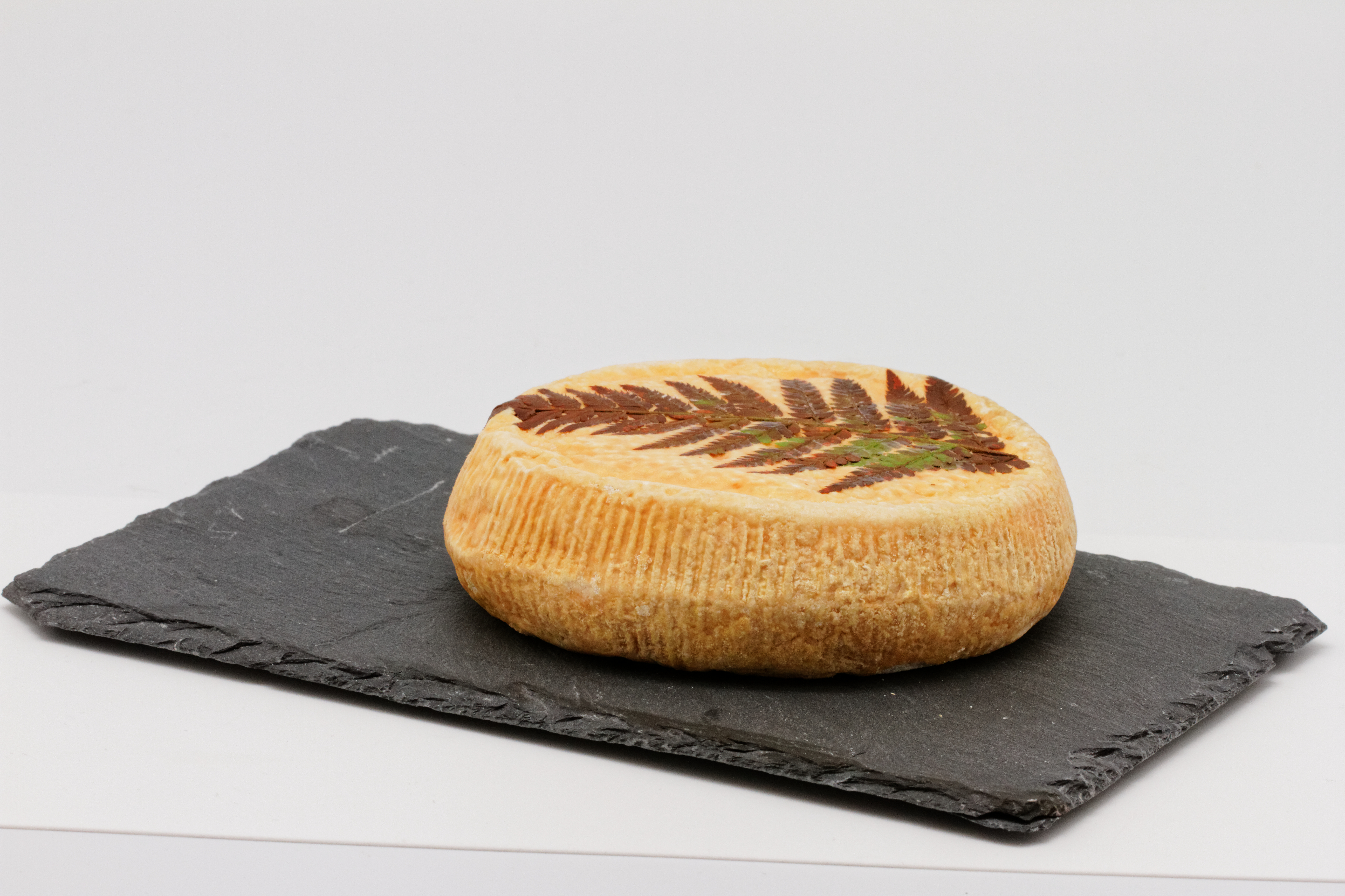 De l'A Filetta, fromage corse.